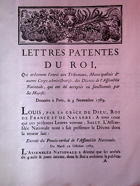 Lettres patentes de Louis XVI promulgant le texte de la déclaration des droits de l'homme et du citoyen, l'abolition des privilèges féodaux, etc